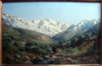 Paisaje de Chillan